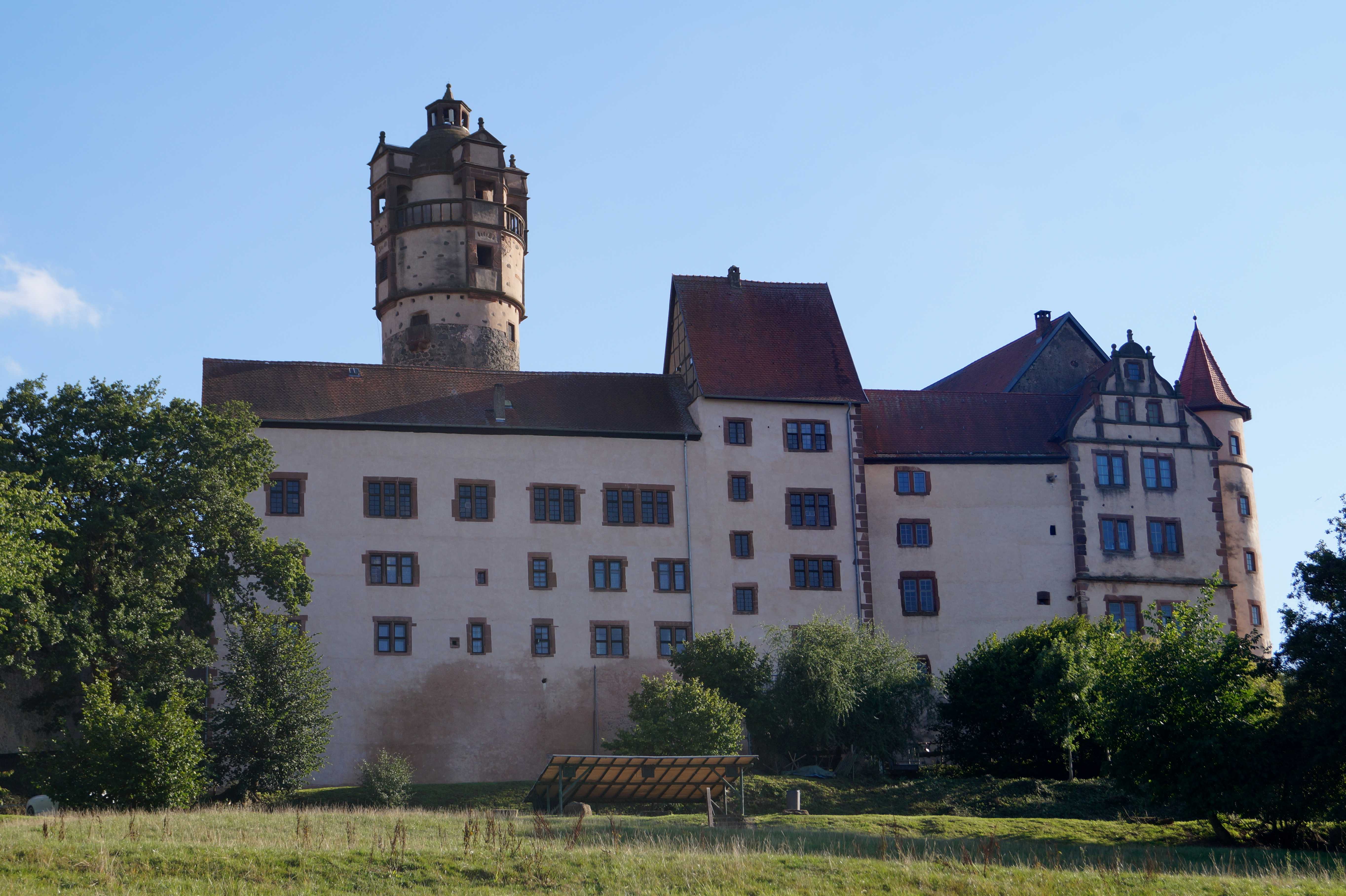 Burg Ronneburg, Gemeinde Ronneburg in Hessen, Ansicht der Kernburg von Norden.